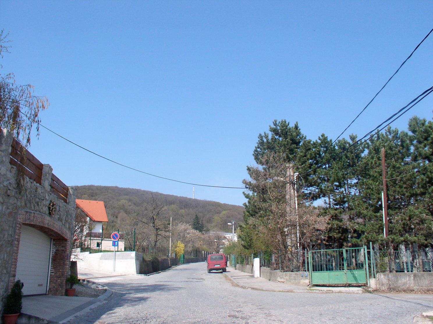 Oblasť Ahoj v hlavnom meste SR Bratislava, v jeho Mestskej časti Bratislava-Nové Mesto v okrese Bratislava III.